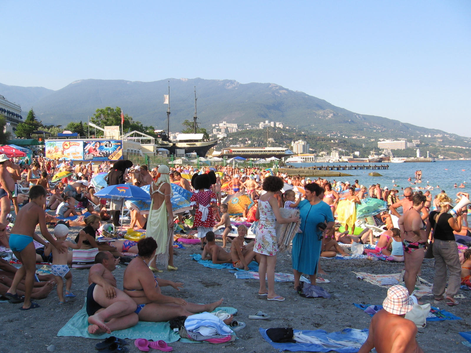 Приморский пляж Ялты днём